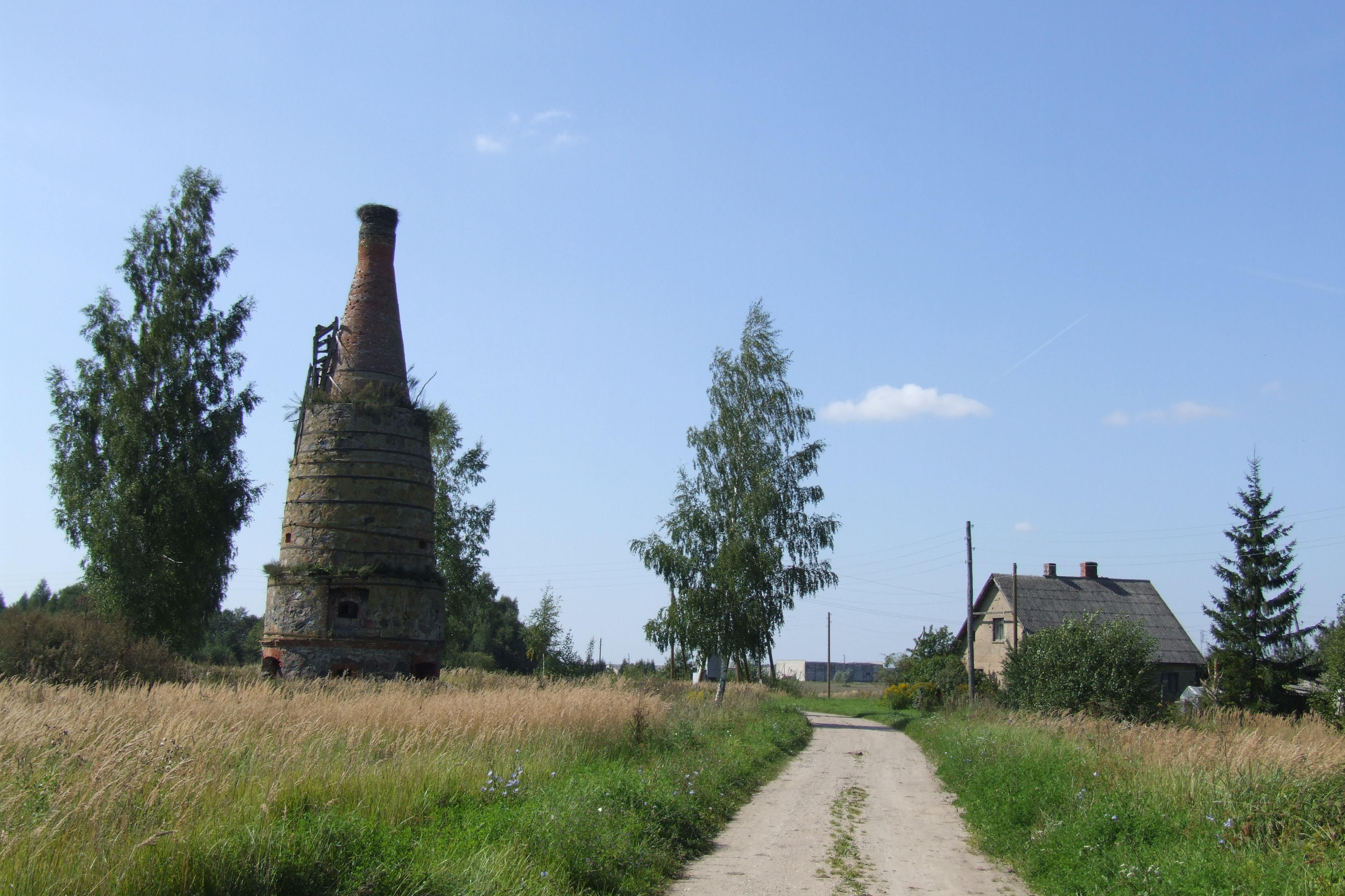 Vītiņu kaļķu ceplis, 26.08.2011.